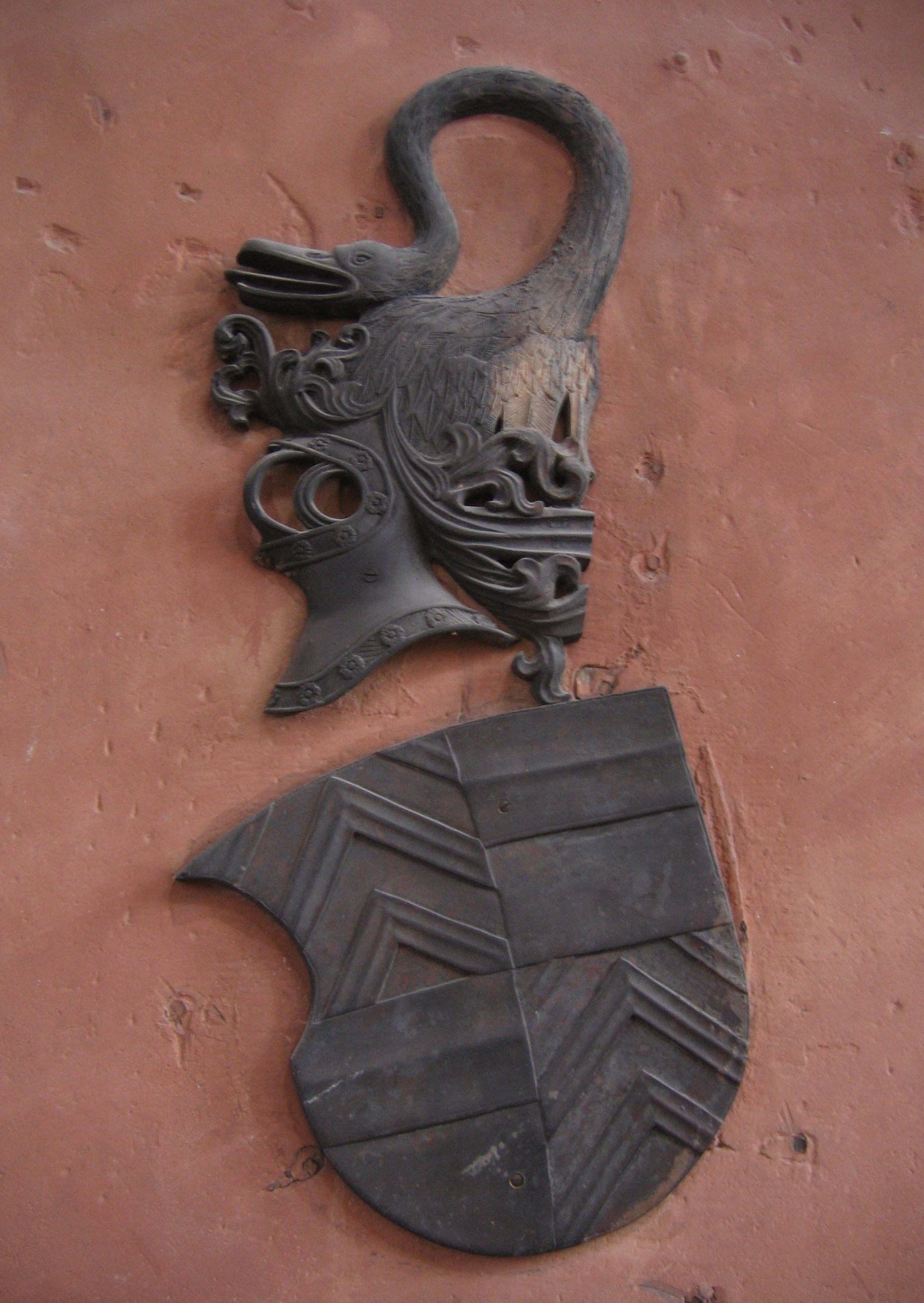 Wappen des Grafen Philipp I., des Jüngeren, von Hanau-Münzenberg auf seiner Grabplatte in der Marienkirche in Hanau